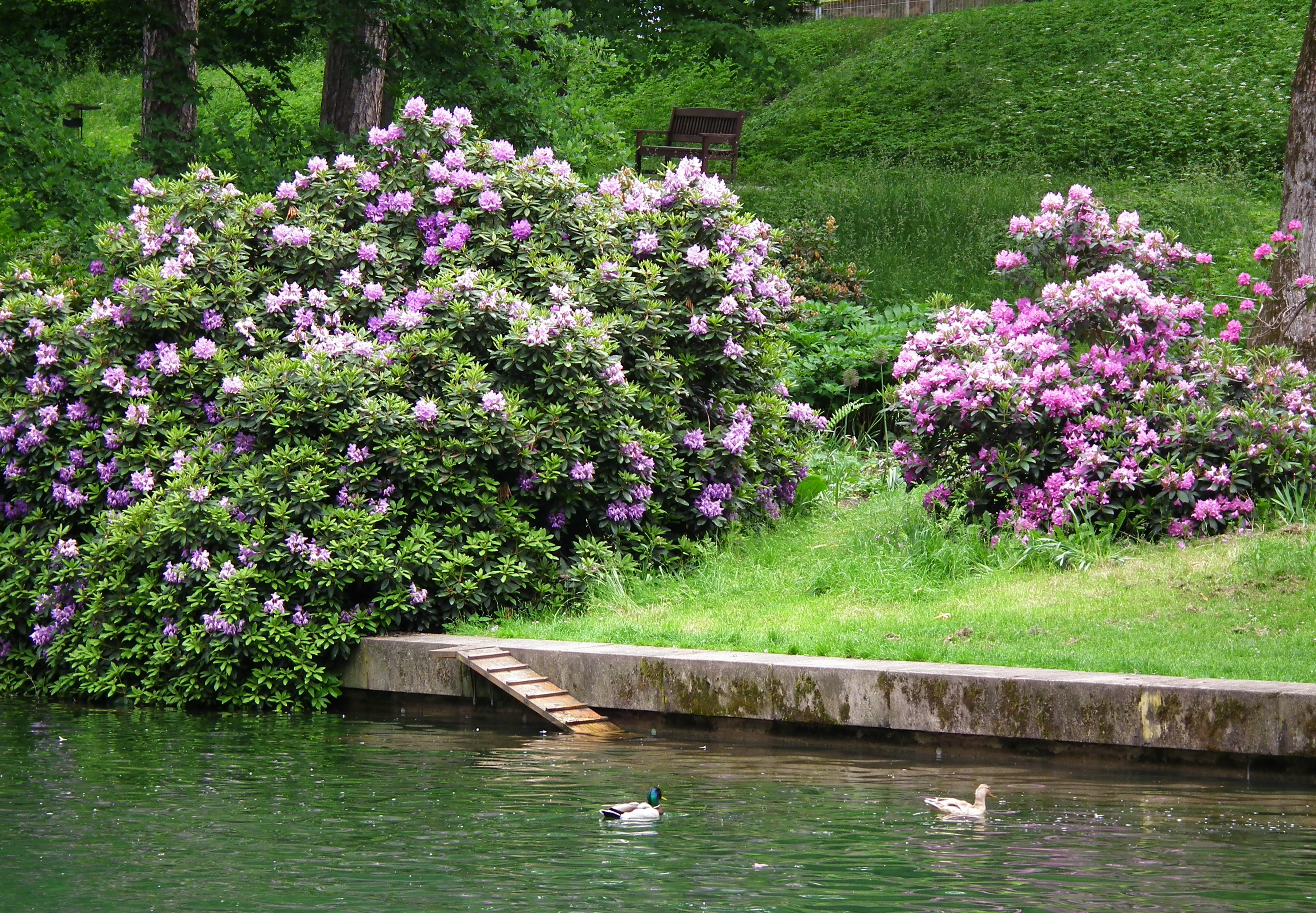 Schlosspark in Fulda (Hessen, Deutschland)